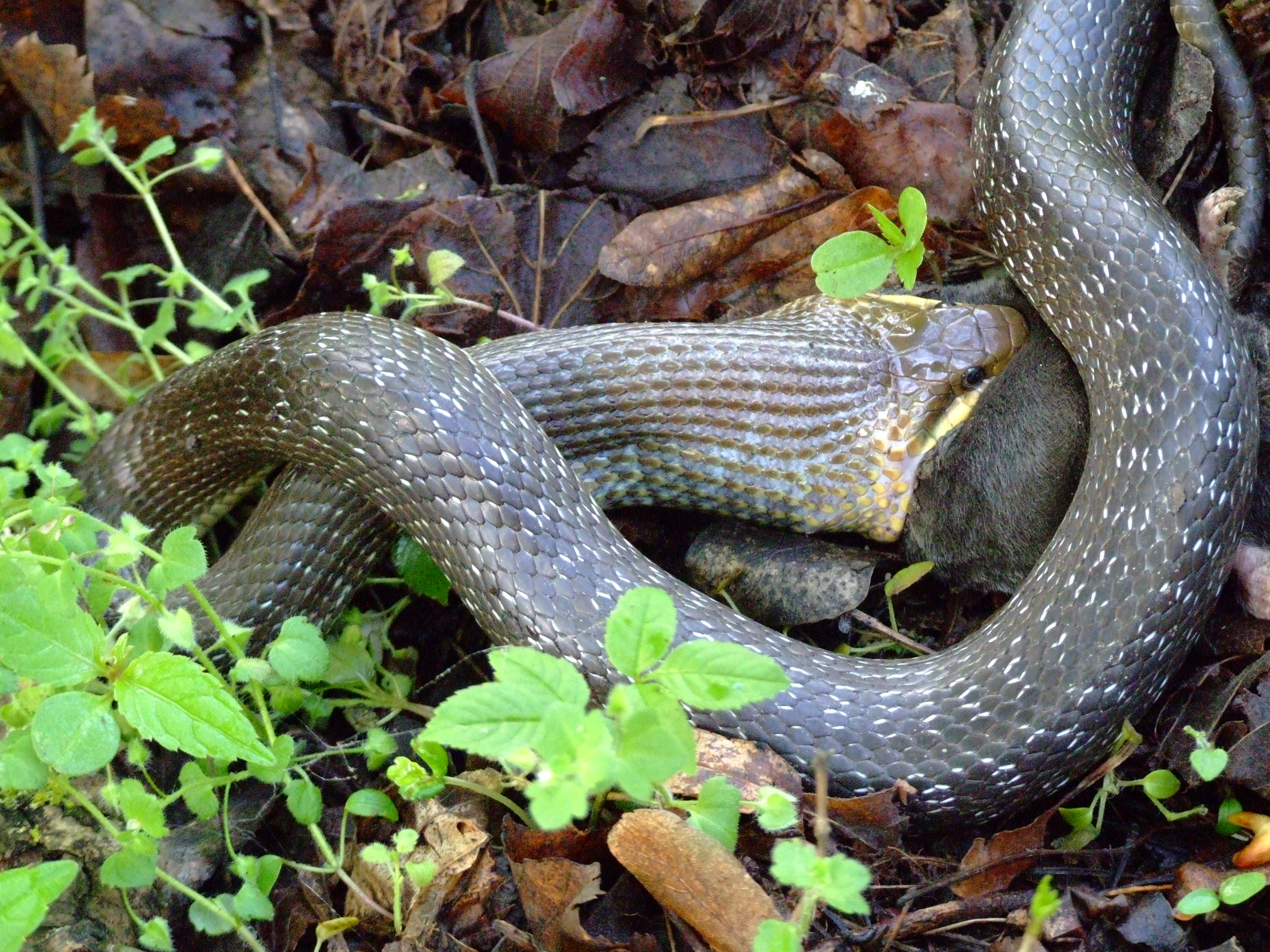 Aesculapian Snake during breakfast